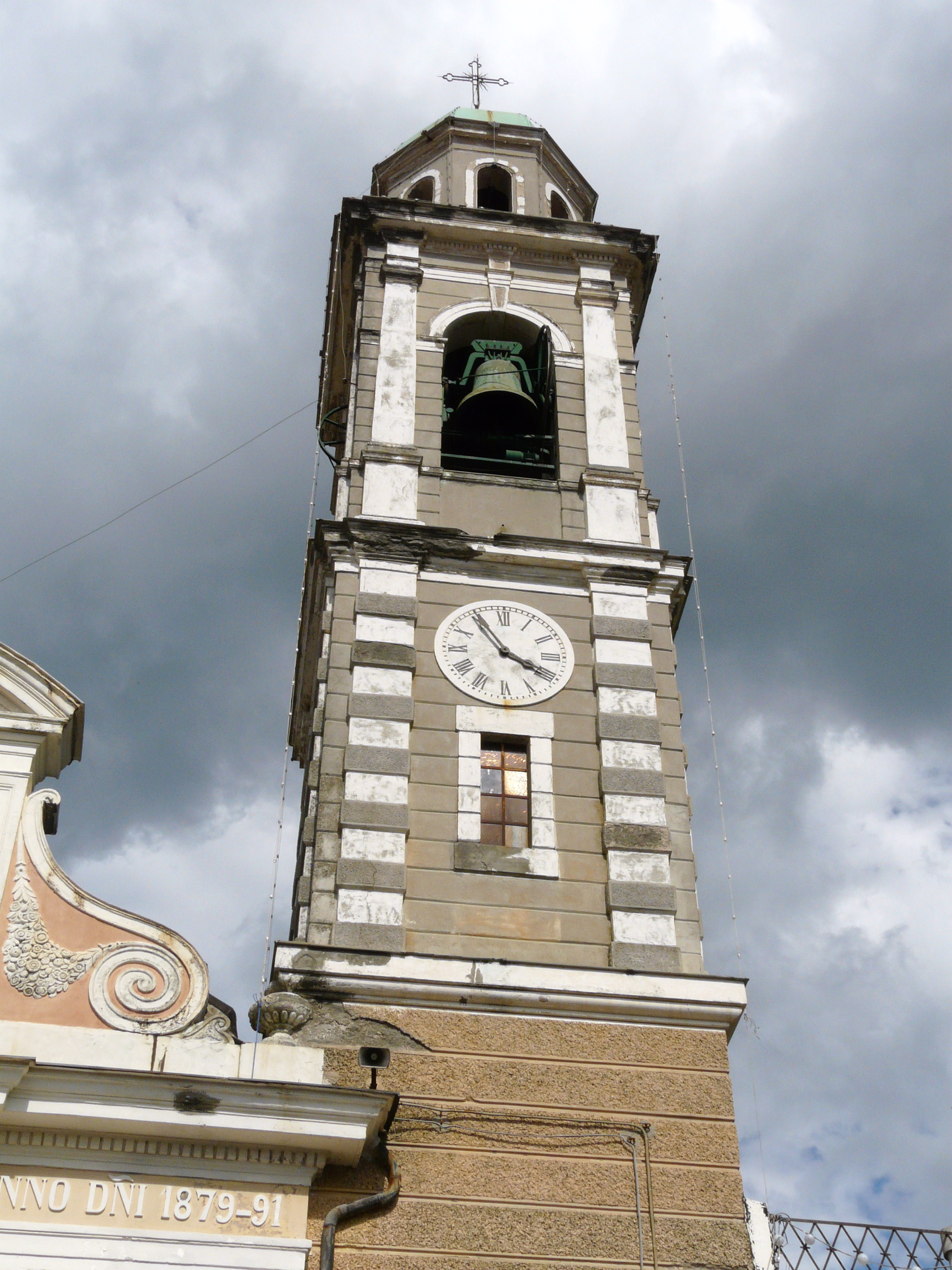 Campanile della chiesa di Santa Caterina, Begato, Genova, Liguria, Italia